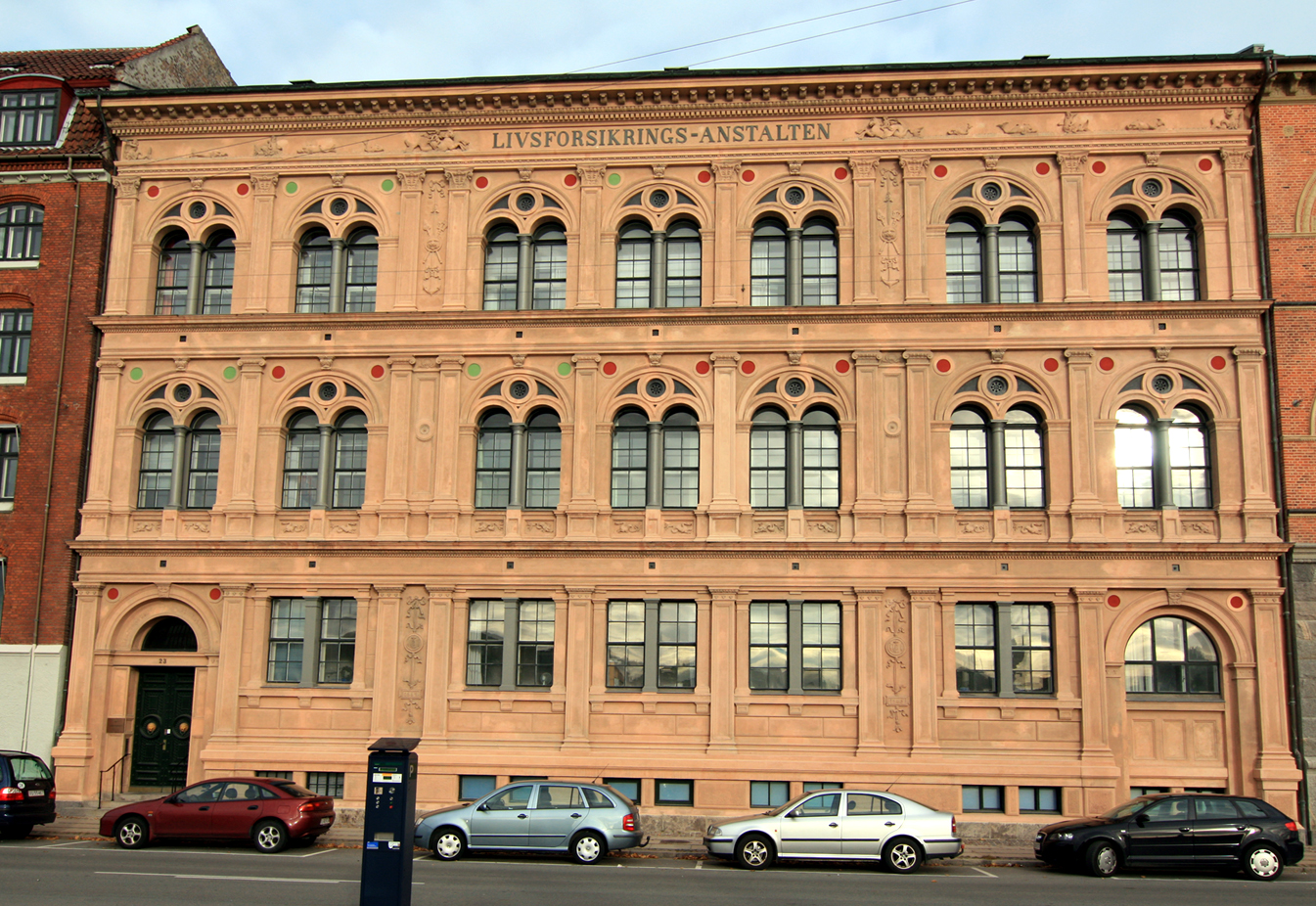 Havnegade 23, København. Bygget 1865. Fredet.